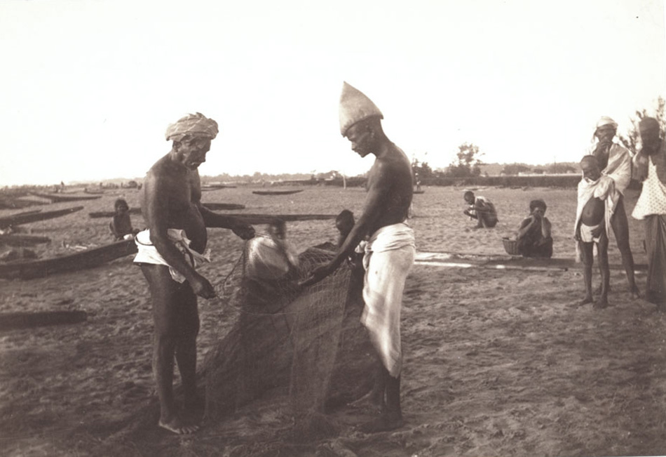 മലബാർ തീരത്ത് മത്സ്യത്തൊഴിലാളികൾ വല തുന്നുന്നു.